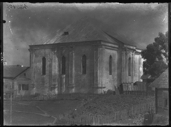 Беларуская (тарашкевіца): Друя (Druja). Сынагога